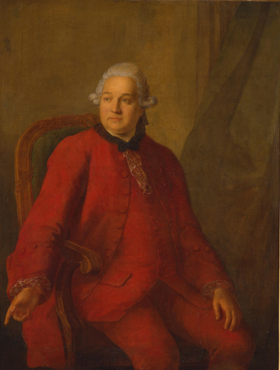 Яков Алексеевич Шубский - придворный певчий, получивший дворянство при Елизавете Петровне. Отдал свое имение Московскому Воспитательномй дому и ушел в монастырь. Портрет Шубского написан Ф. Баризьеном